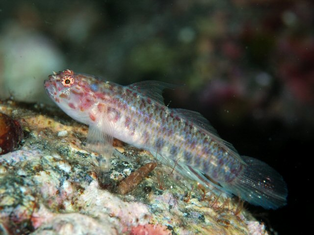 アカイソハゼ Eviota masudai